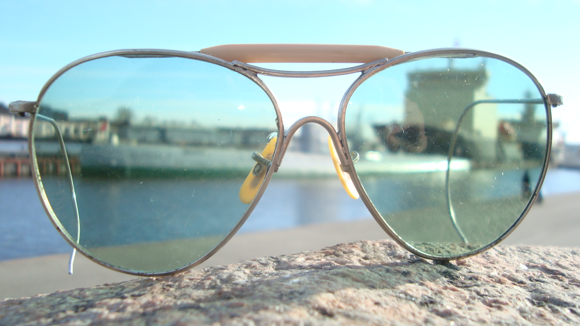 Солнцезащитные и ветрозащитные очки 1930-40-х годов для пилотов американской армии